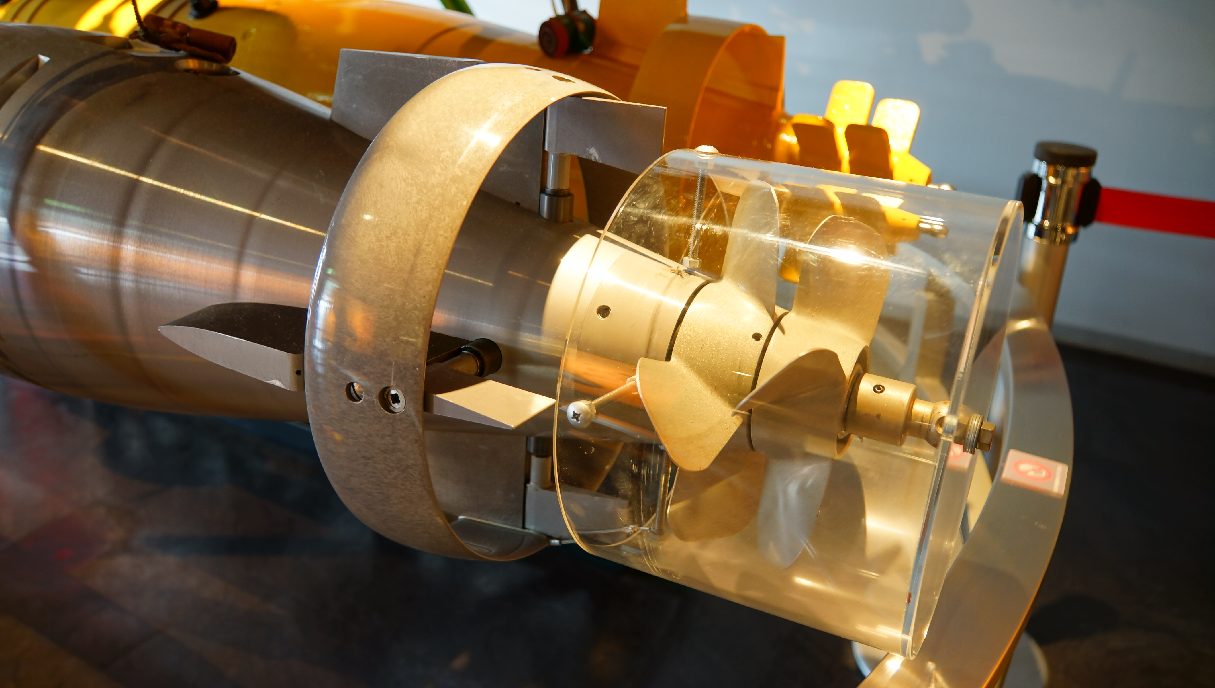 海上自衛隊 73式短魚雷 スクリュープロペラ。 14年9月15日 海上自衛隊呉史料館内にて。